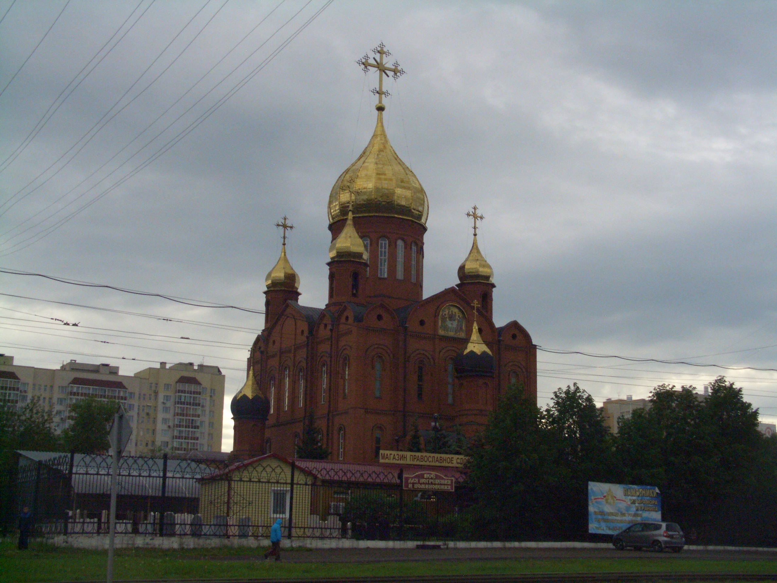 Знаменский кафедральный собор: улица Соборная, 24, Кемерово, Кемеровская область